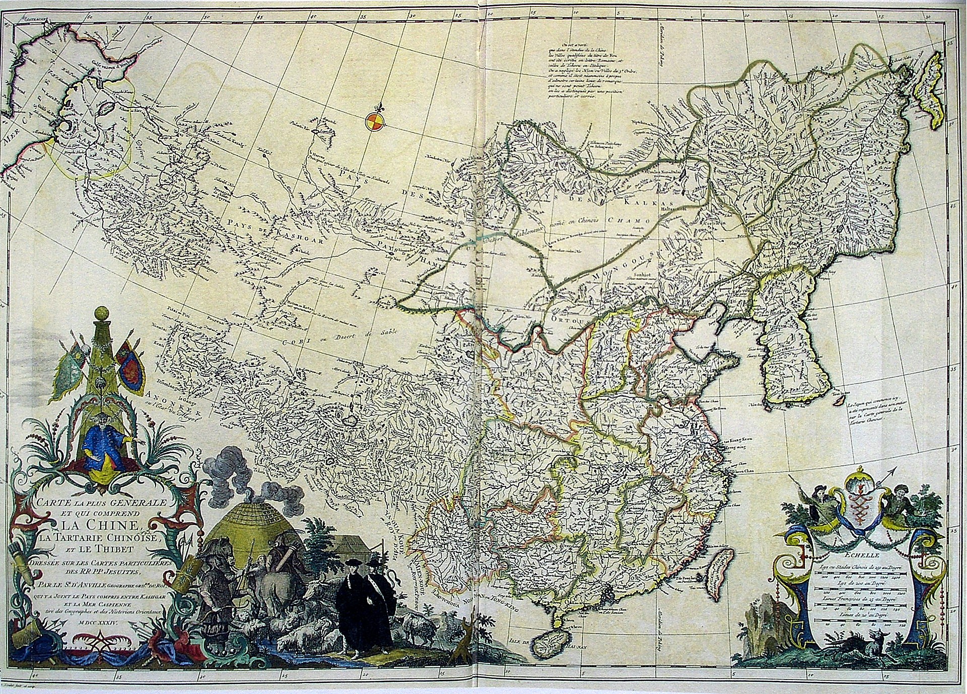 מפה צרפתית של שושלת צ'ינג בתקופת שלטונו של יונג-ג'נג